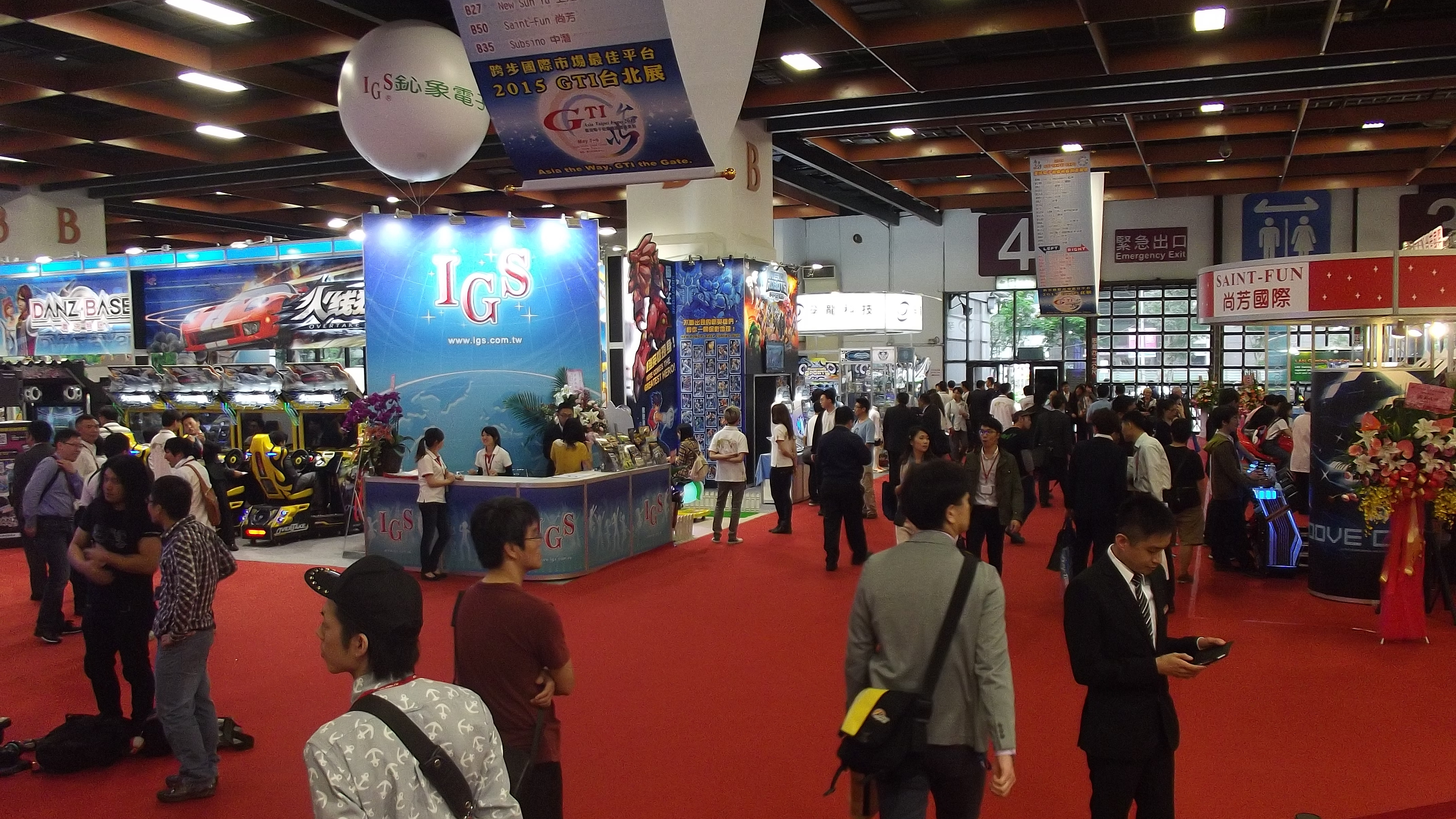 2014 GTI Asia Taipei Expo.